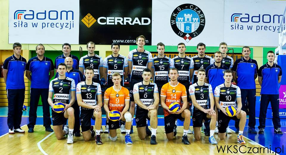 Zespół siatkarski - Czarni Radom - sezon 2014/15